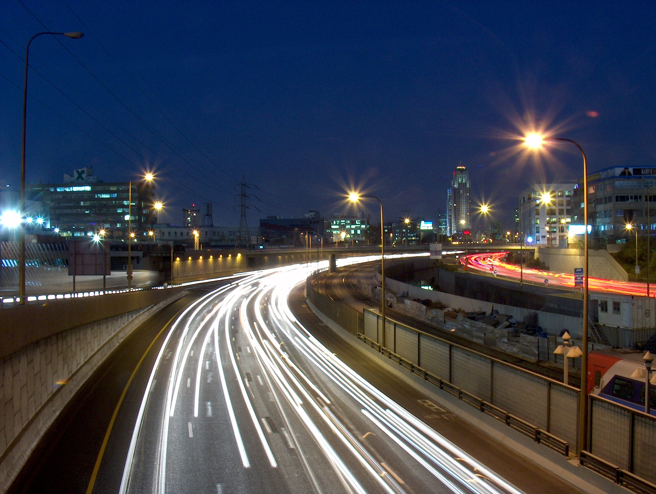 נתיבי איילון